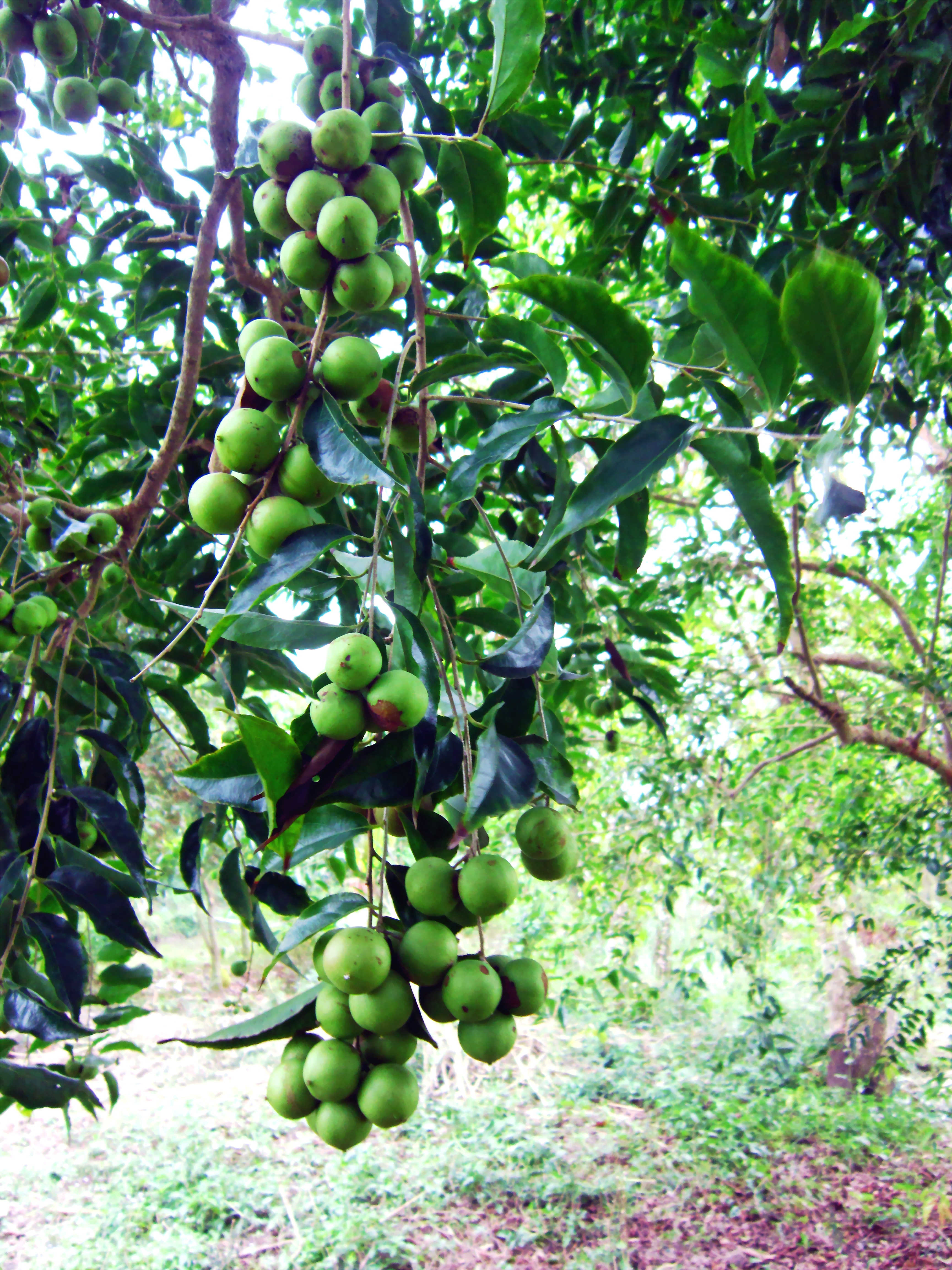 Trái hồng quân (Flacourtia jangomas) còn xanh ở trên cành.